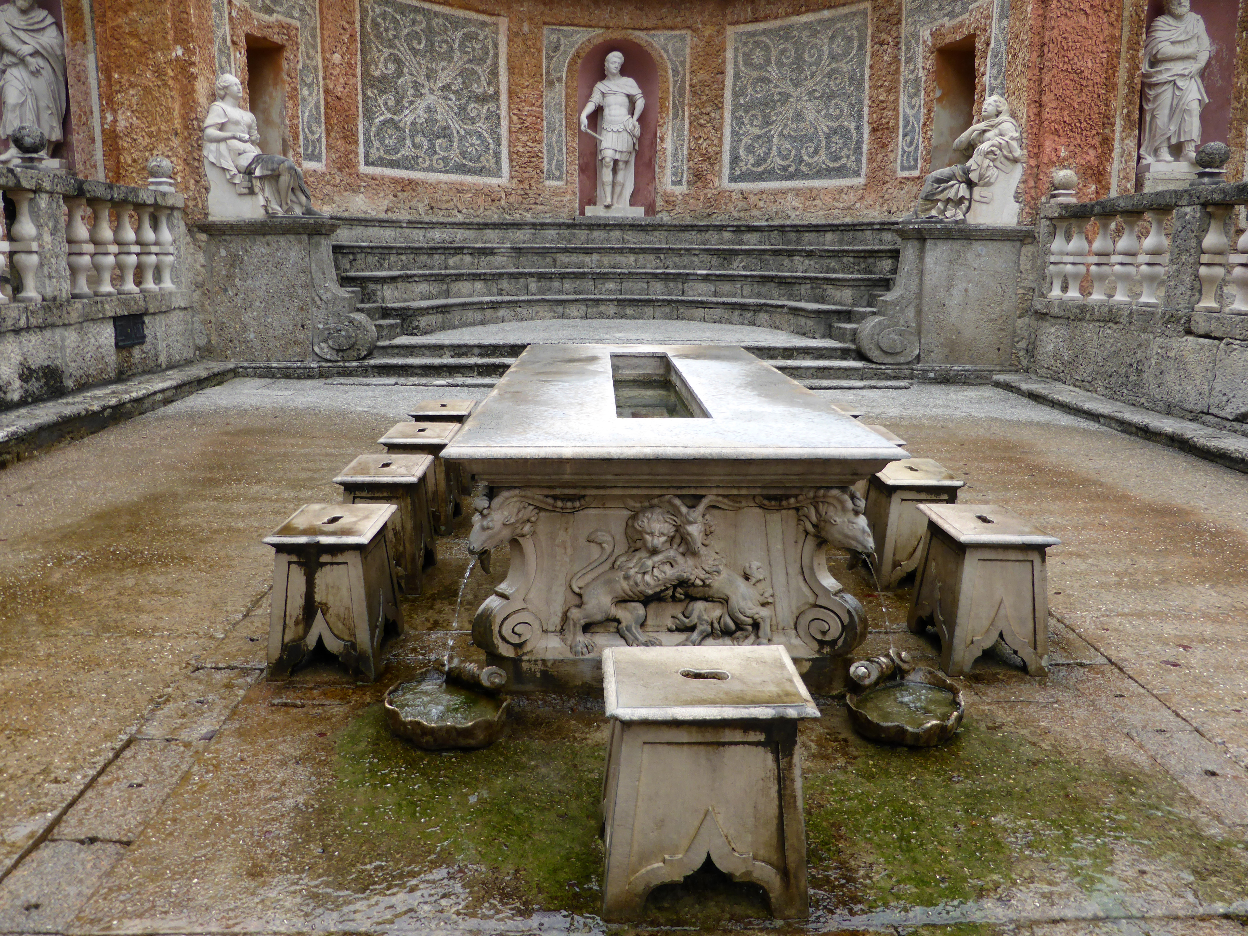 Wasserspiele Schloss Hellbrunn (Römisches Theater), Salzburg.